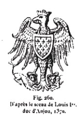 Louis I, duc d Anjou - 1370